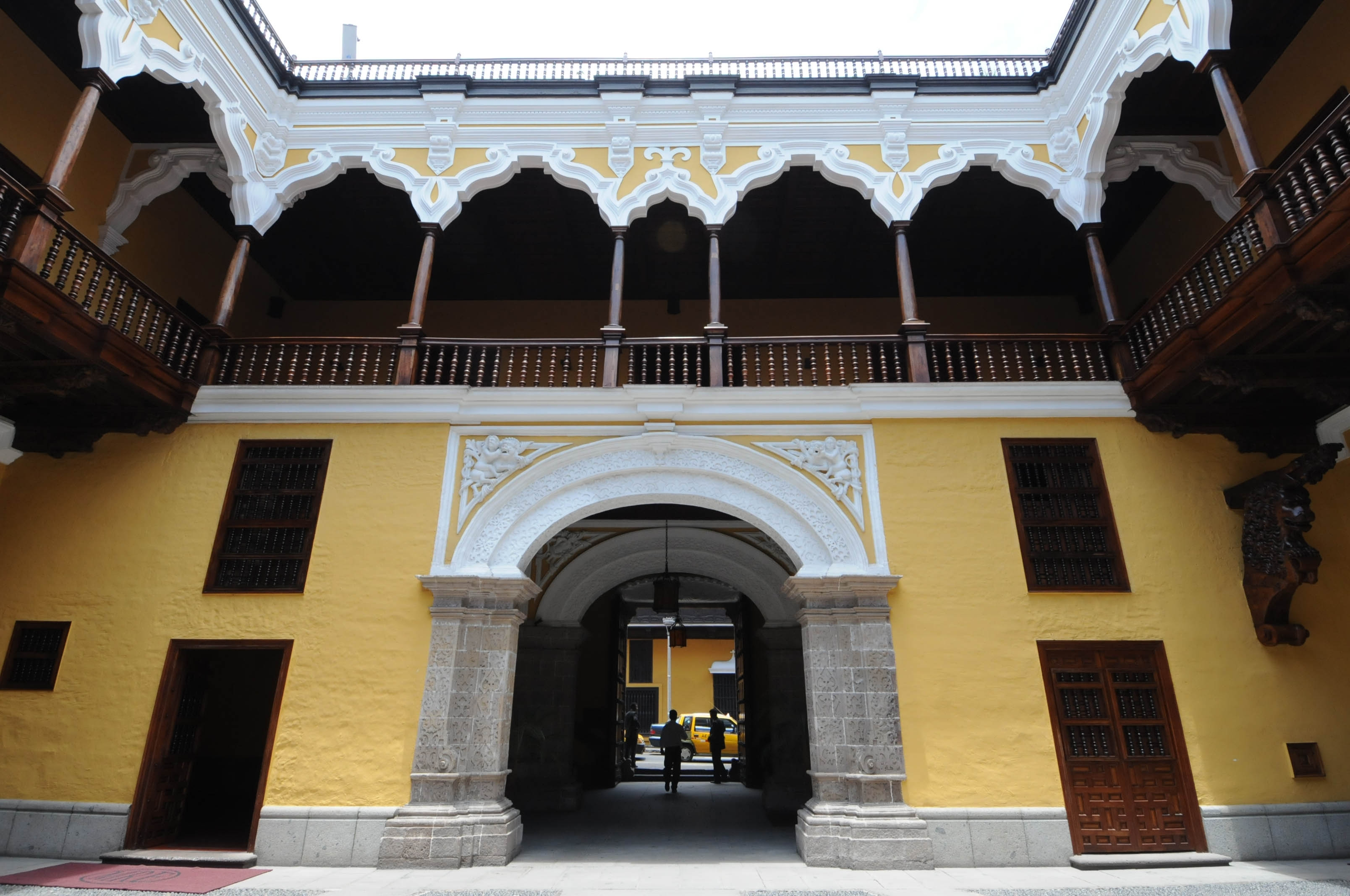 ZAGUÁN Y BALCONES INTERNOS DEL PALACIO DE TORRE TAGLE VISTOS DESDE EL PATIO PRINCIPAL